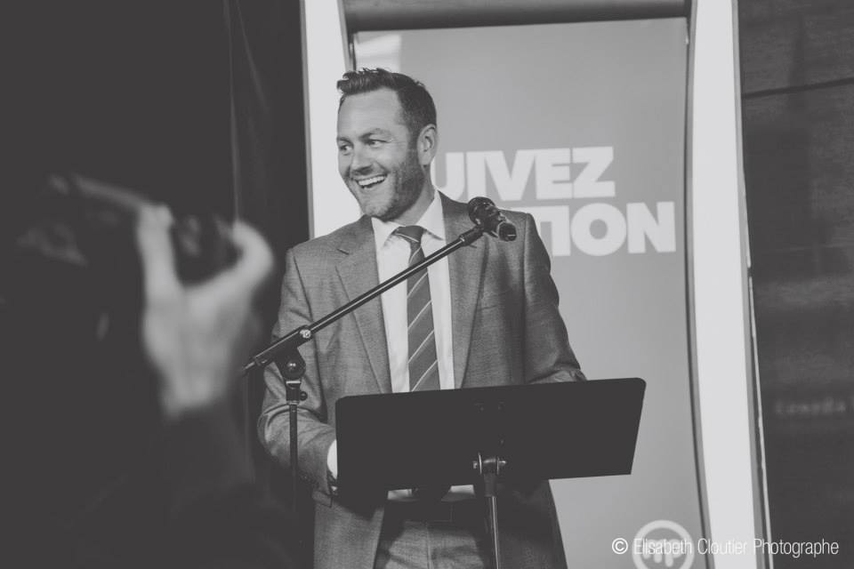 Maxime Rémillard au lancement de programmation de MusiquePlus en 2015.